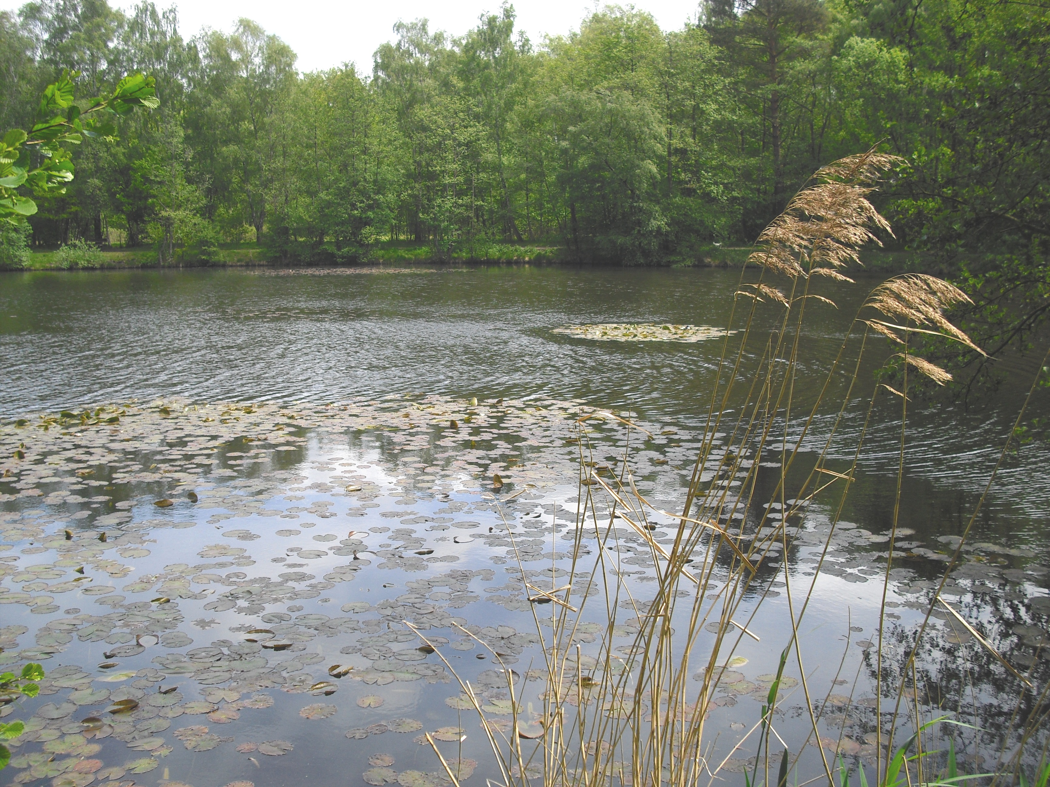 Raakmoor